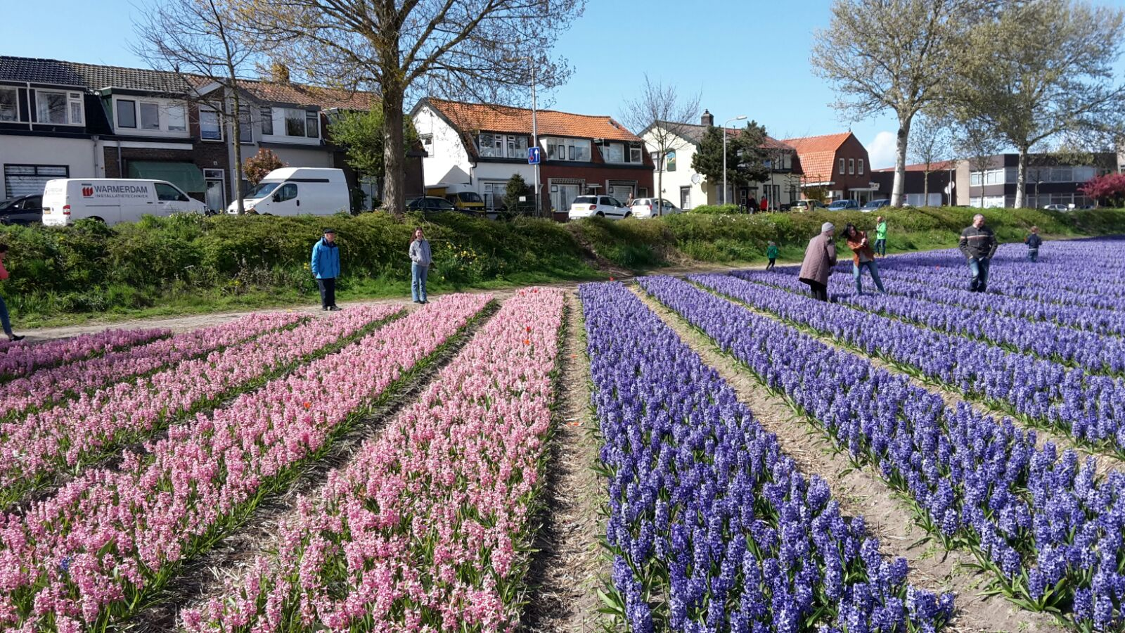 Bollenveld 3e Loosterweg Hillegom